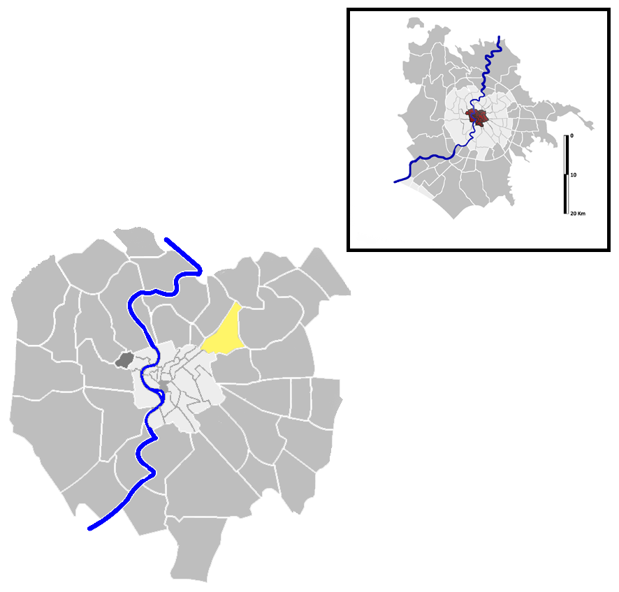 Nomentano